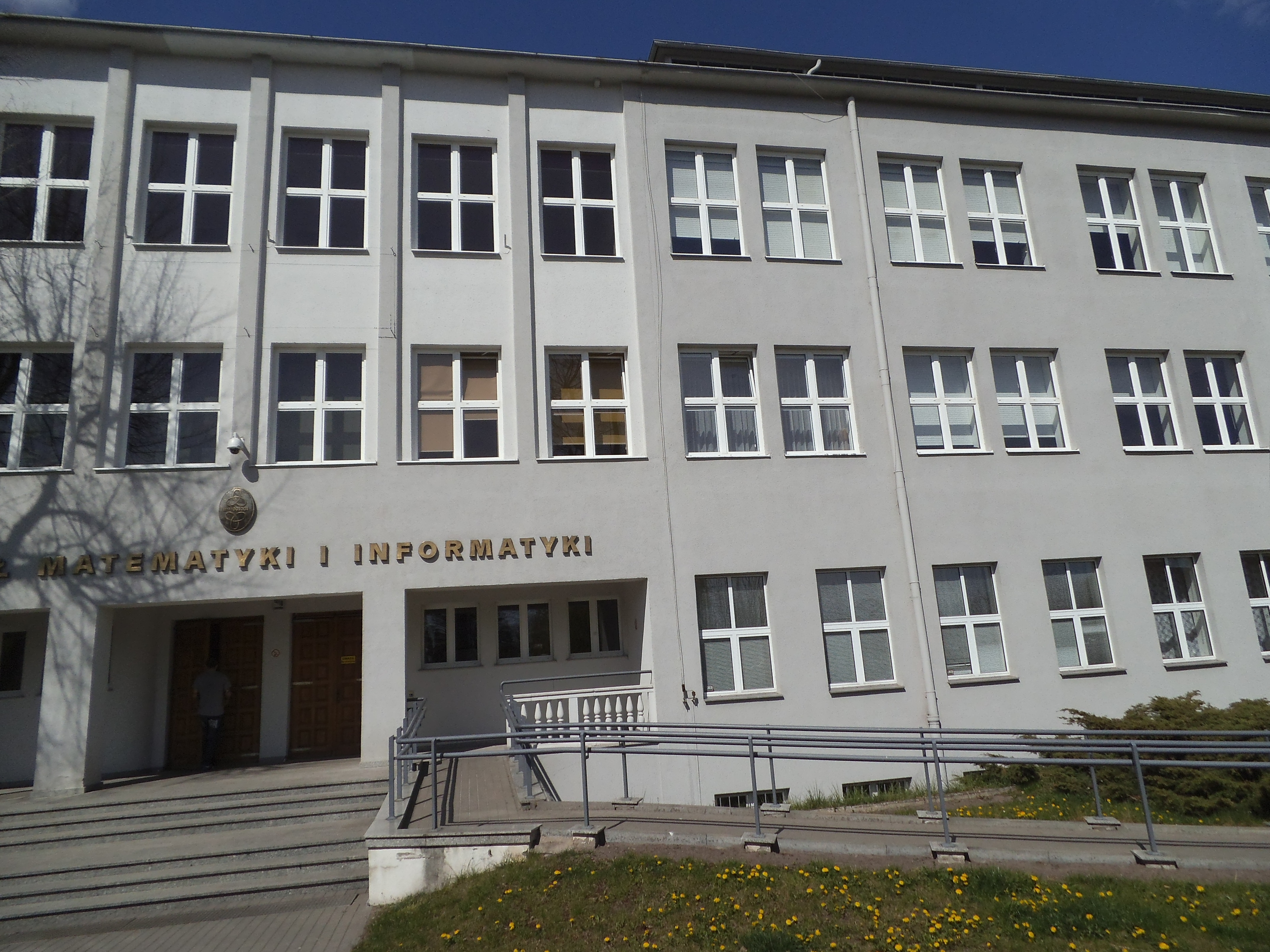 Wydział UMK w Toruniu